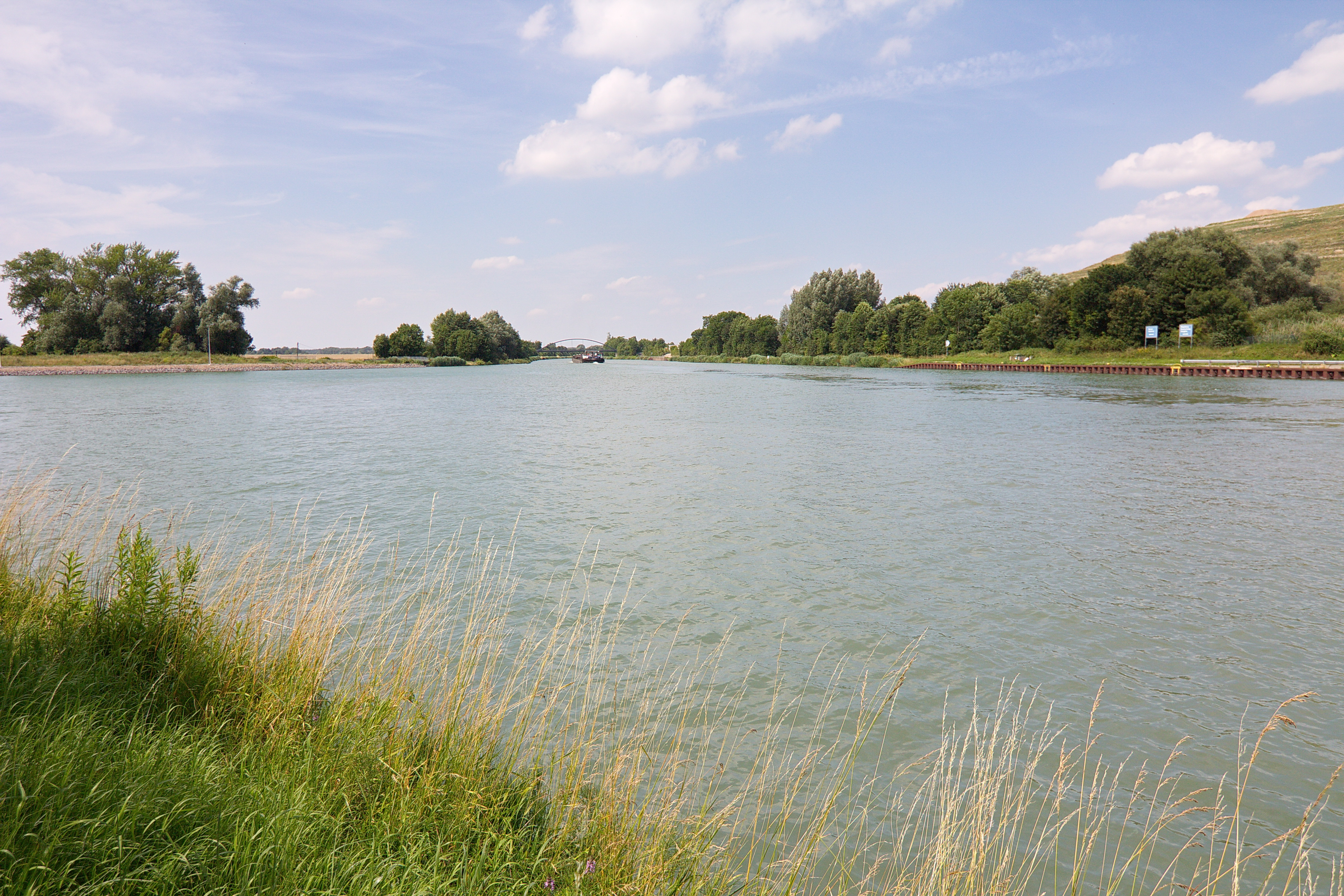 Mittellandkanal bei Bolzum (Sehnde), Niedersachsen, Deutschland